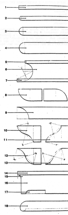 Modanature greche: 1, 5, 7, 14. Listello; 2. Astragalo; 3, 4. Toro; 6. Scozia (a catino); 8. Echino (e rovescio); 9, 15. Cavetto; 10. Gola rovescia; 11. Gola rovescia supina; 12. Gola dritta; 13. Gola dritta rovescia; 16. Gocciolatoio del cornicione con canaletto dell'intradosso (17.); 18. Becco di civetta. Da Gabriele Morolli Le membra degli ornamenti, Alinea Editrice.